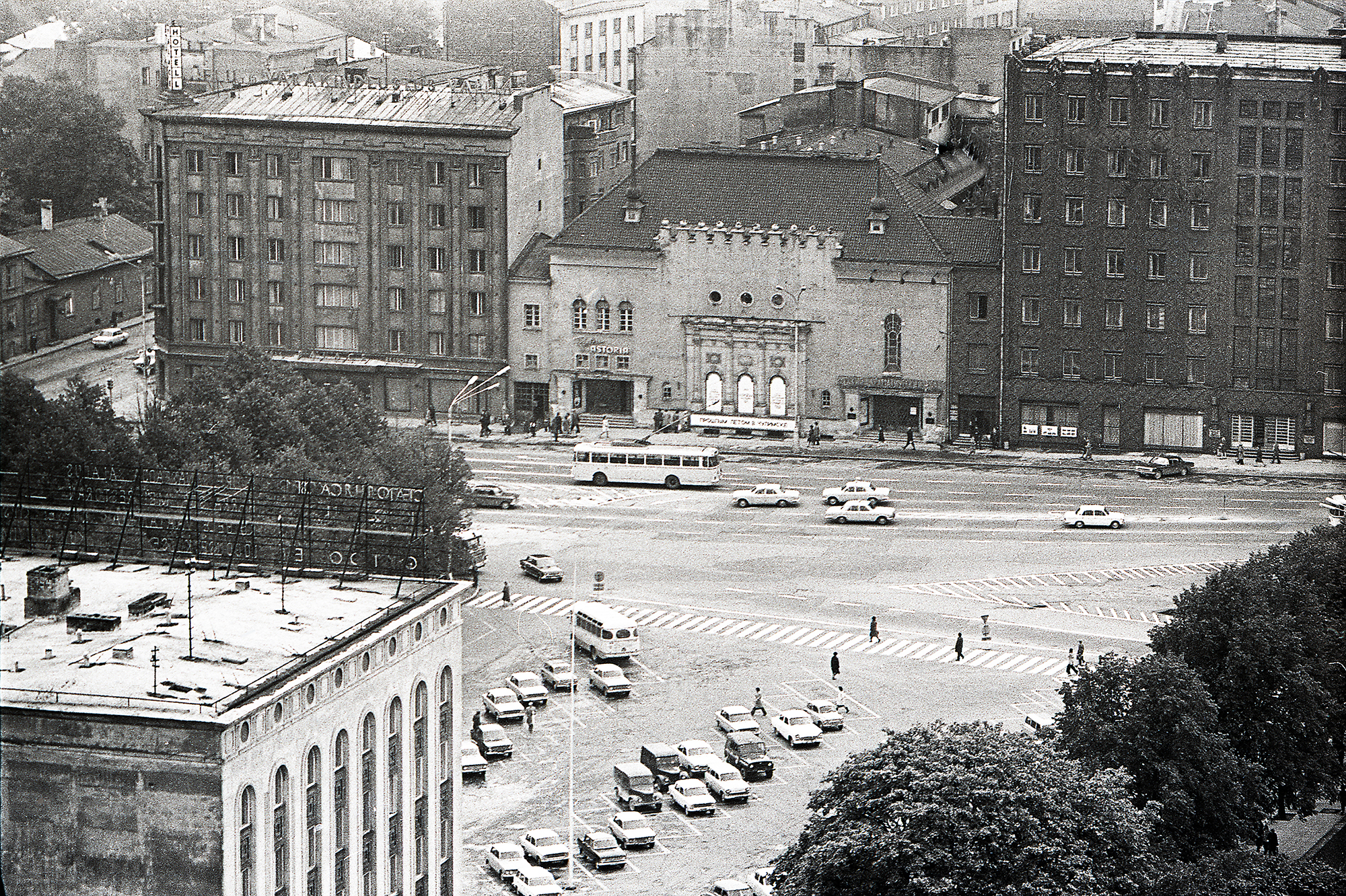 Võiduväljak 74